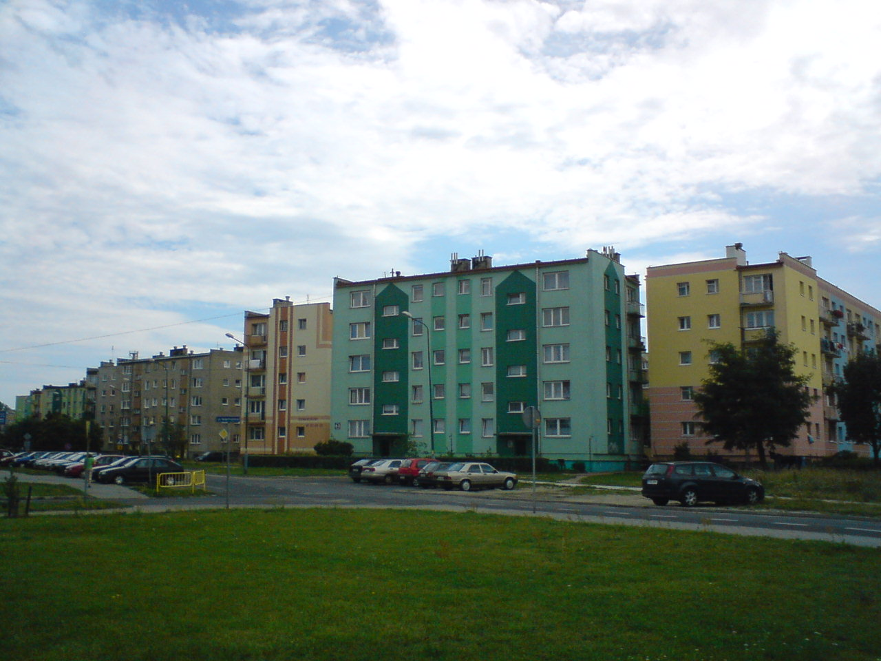 Osiedle Moniuszki (Wieniawskiego Str.), Żary